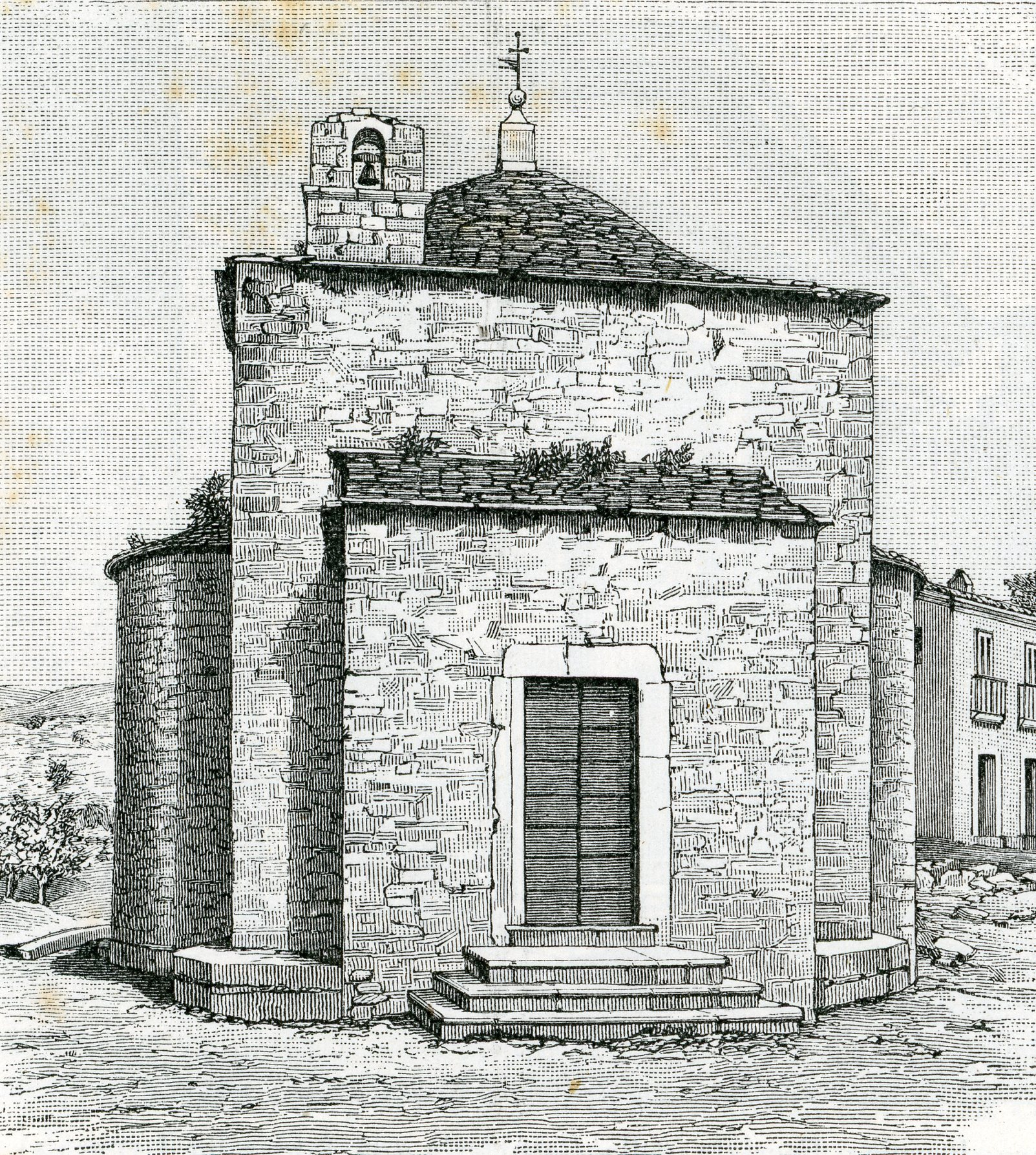 Longano: cappella campestre di San Rocco (incisore anonimo 1898).